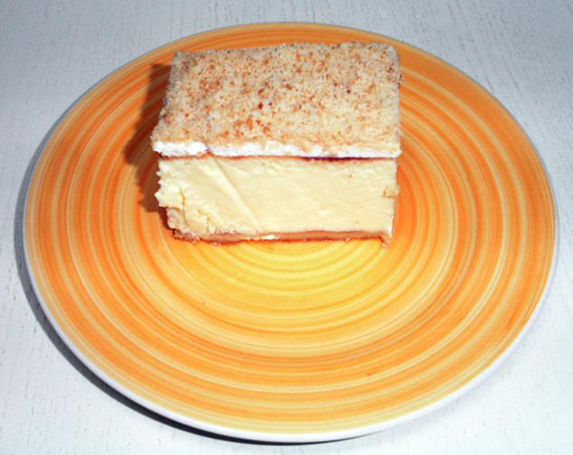 Cheesecake.